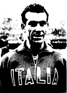 Il velocista italiano Carlo Monti. Carlo Monti (1920–2016) DescriptionItalian sprinterDate of birth/death 24 March 1920 7 April 2016Location of birth/death Milan MilanAuthority control : Q1042330 creator QS:P170,Q1042330